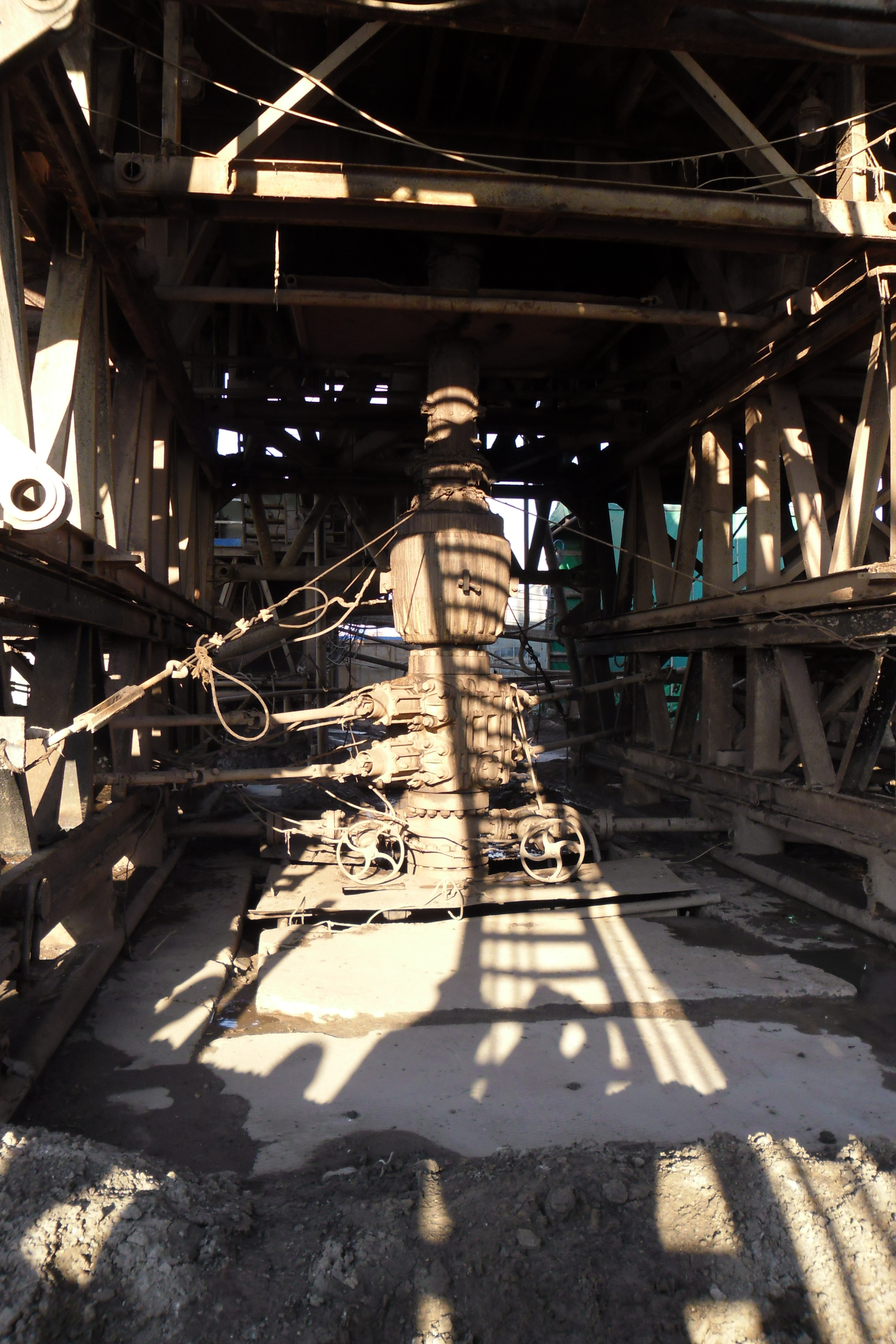 Фото